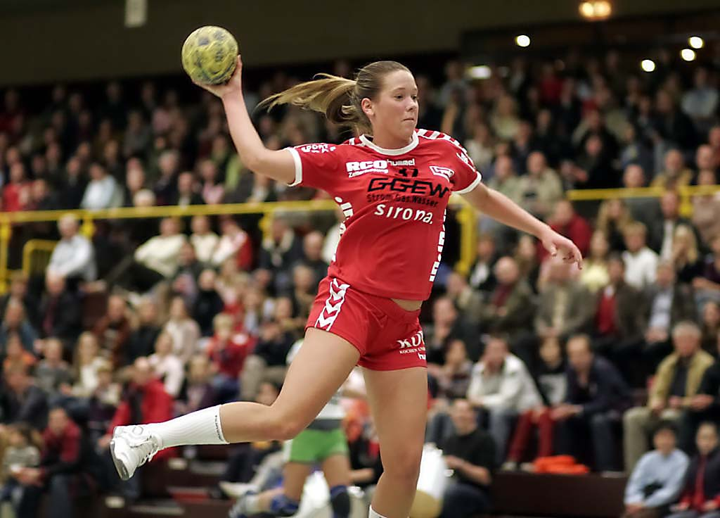 Sandra Kleinjung, am 12. November 2006 bei Bundesligaspiel HSG Bensheim/Auerbach - TV Mainzlar in der Bensheimer Weststadthalle.